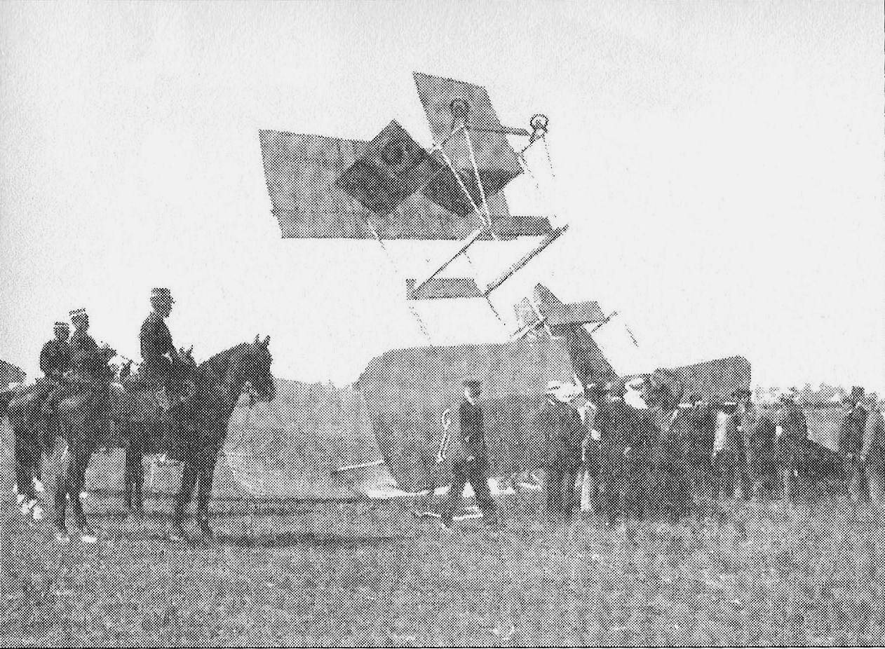 In La_Vie_au_Grand_Air, le Breguet_N°19_accidenté.